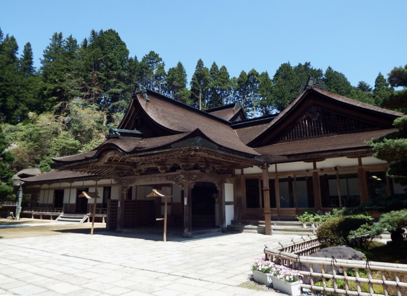 金剛三昧院 客殿